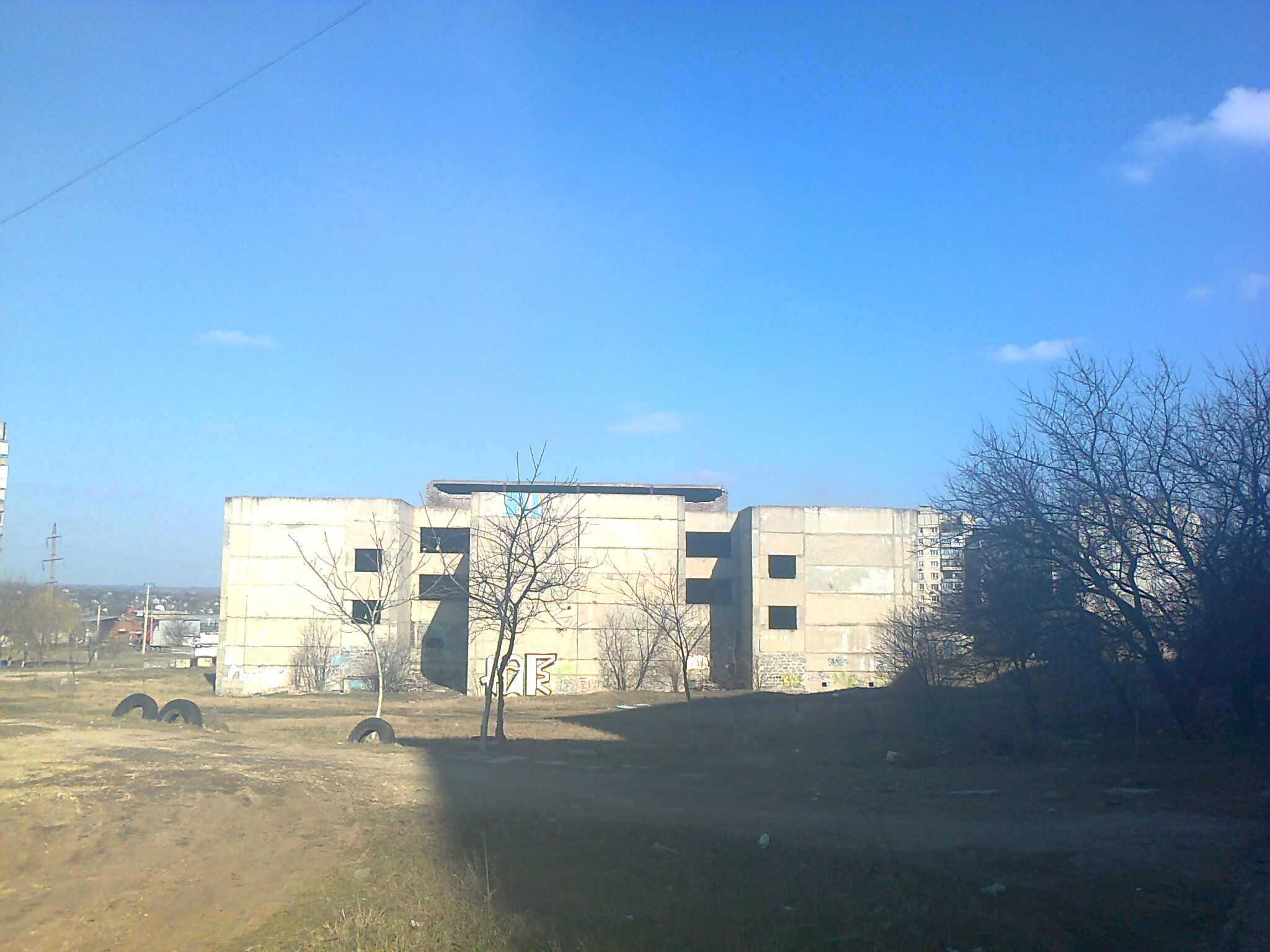 Заброшенная школа на 23МКР в Мариуполе.